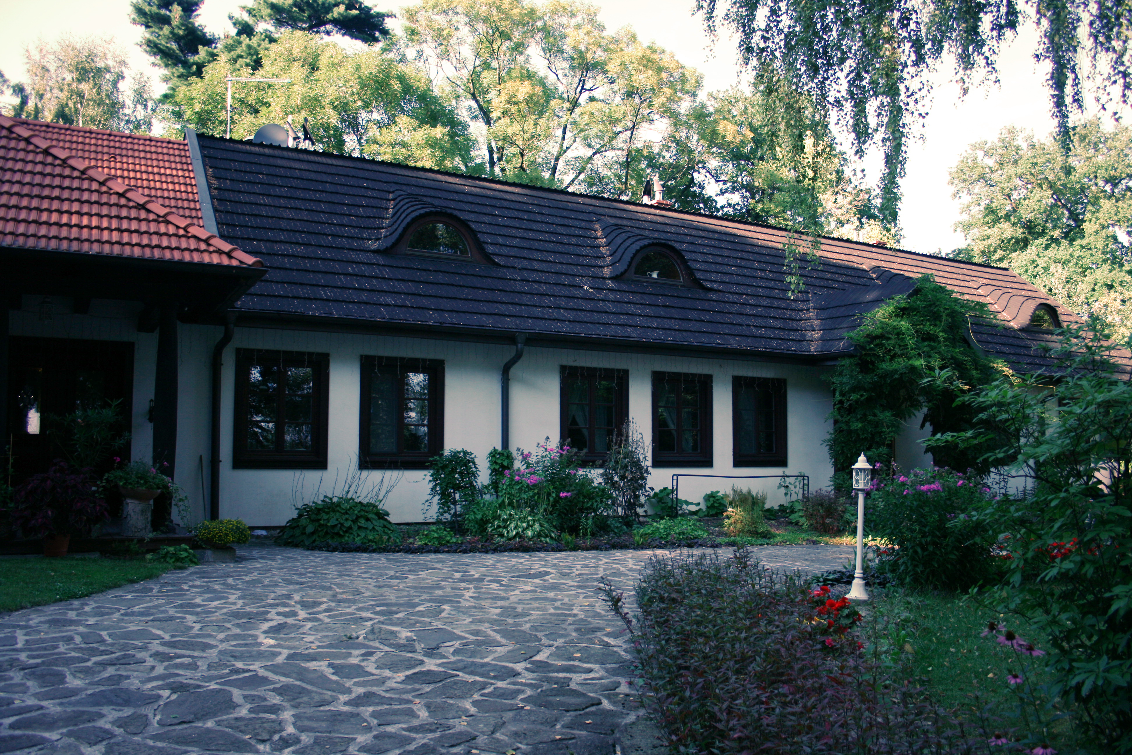 Dwór w Jurczycach